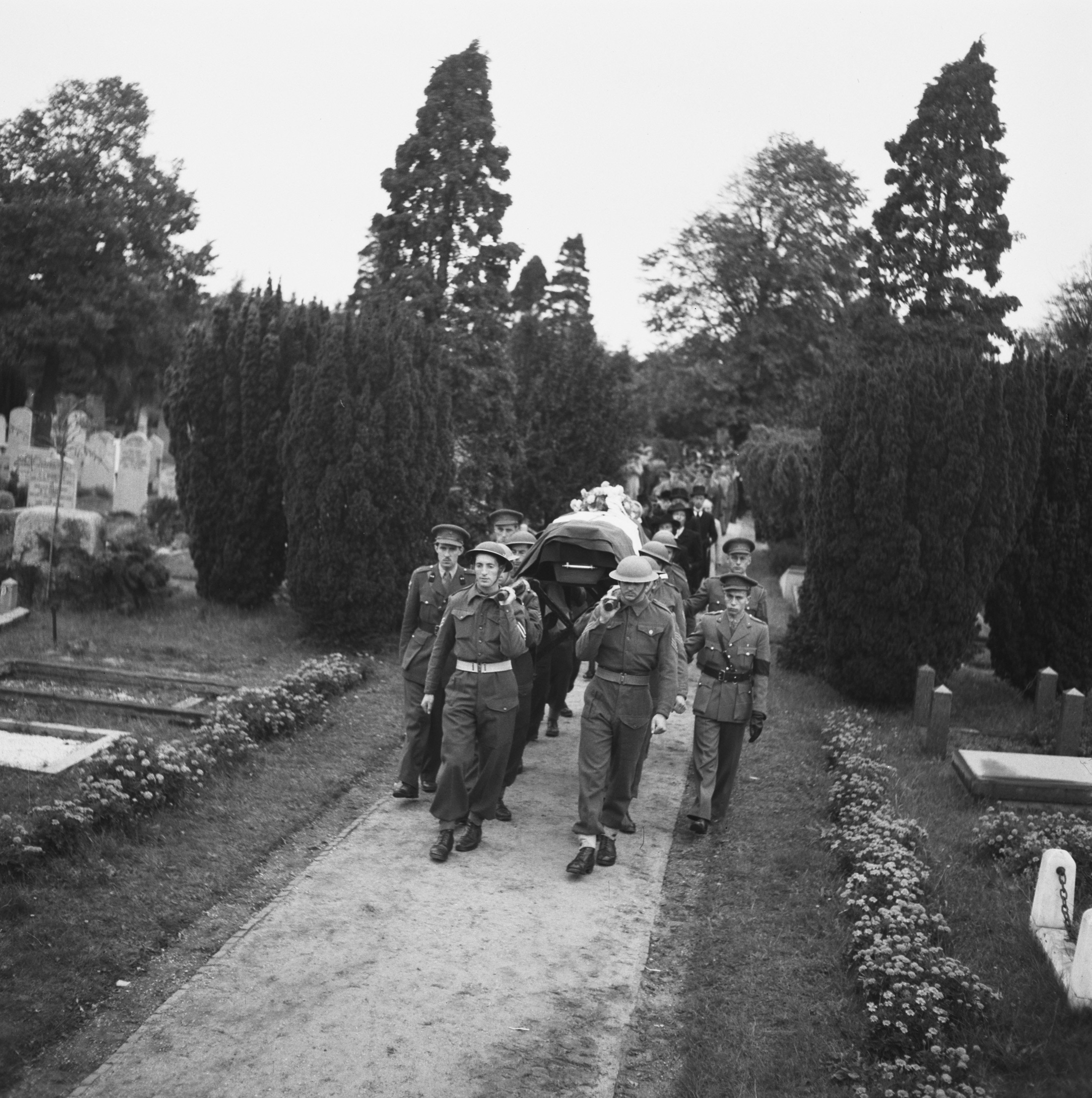 Begrafenis van Lange Jan van Bussum. Jan Thijssen bijgenaamd "Lange Jan", in leven leider van de radioafdeling Nederlandse Binnenlandse strijdkrachten, met militaire eer te Loenen begraven.